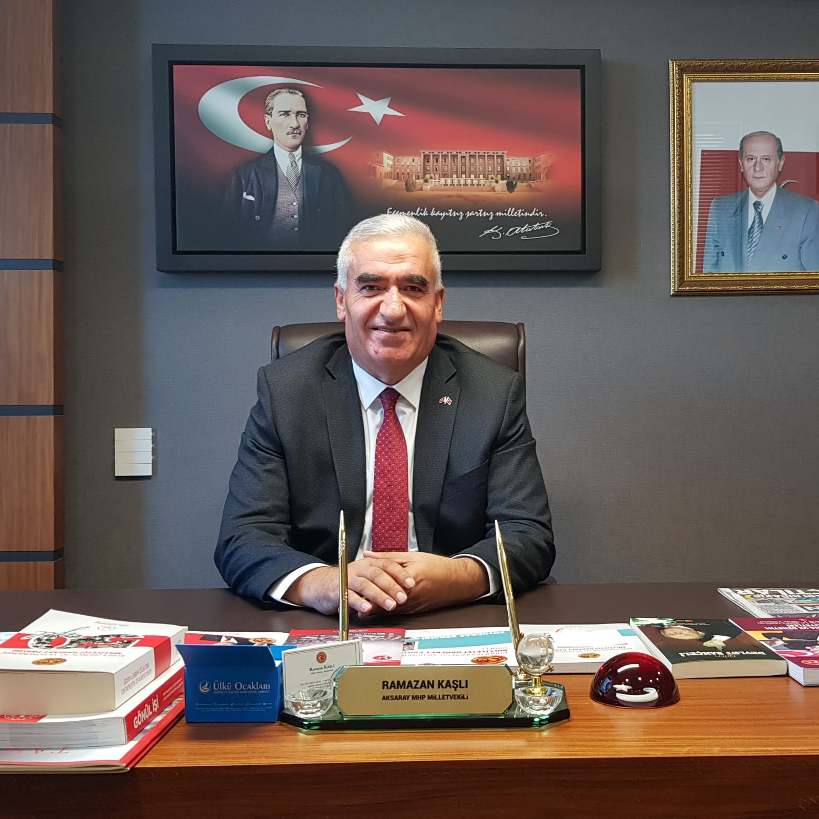 MHP Aksaray Milletvekili Ramazan KAŞLI